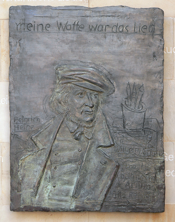 Denkmal Hoffmann von Fallersleben am Landtag in Hannover